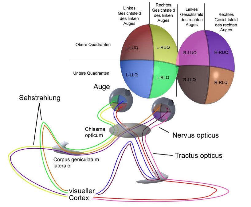 Schematischer Verlauf der Sehbahn.